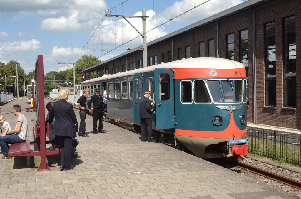 Nederlands Spoorwegmuseum NS DE 41 Heimwee Express. Foto: Erik Swierstra.